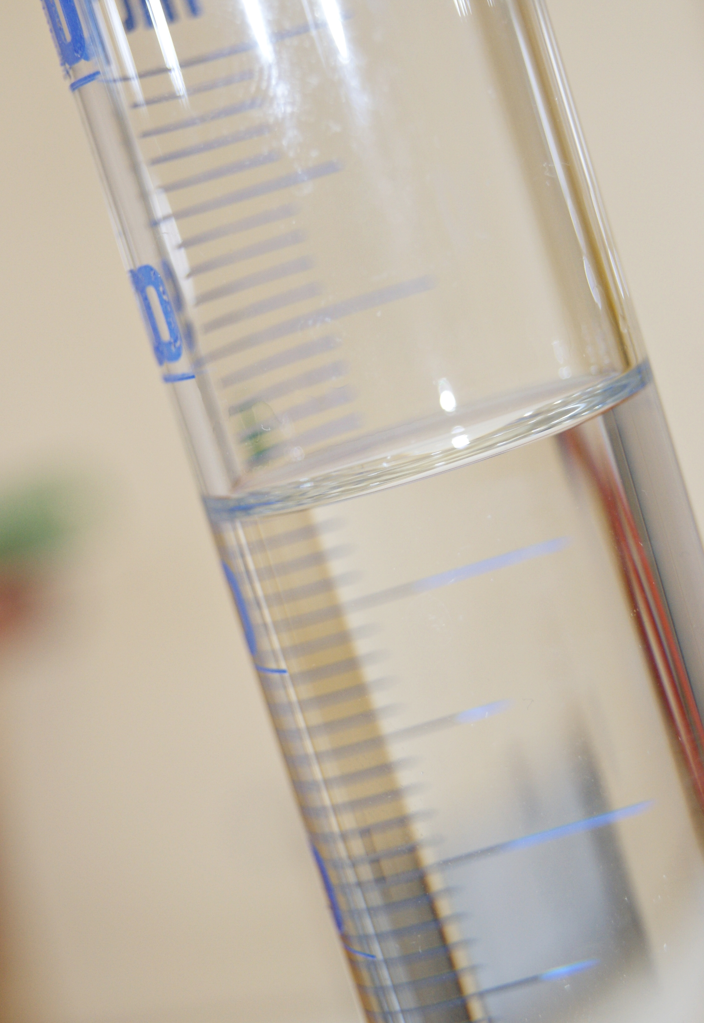 Methanol